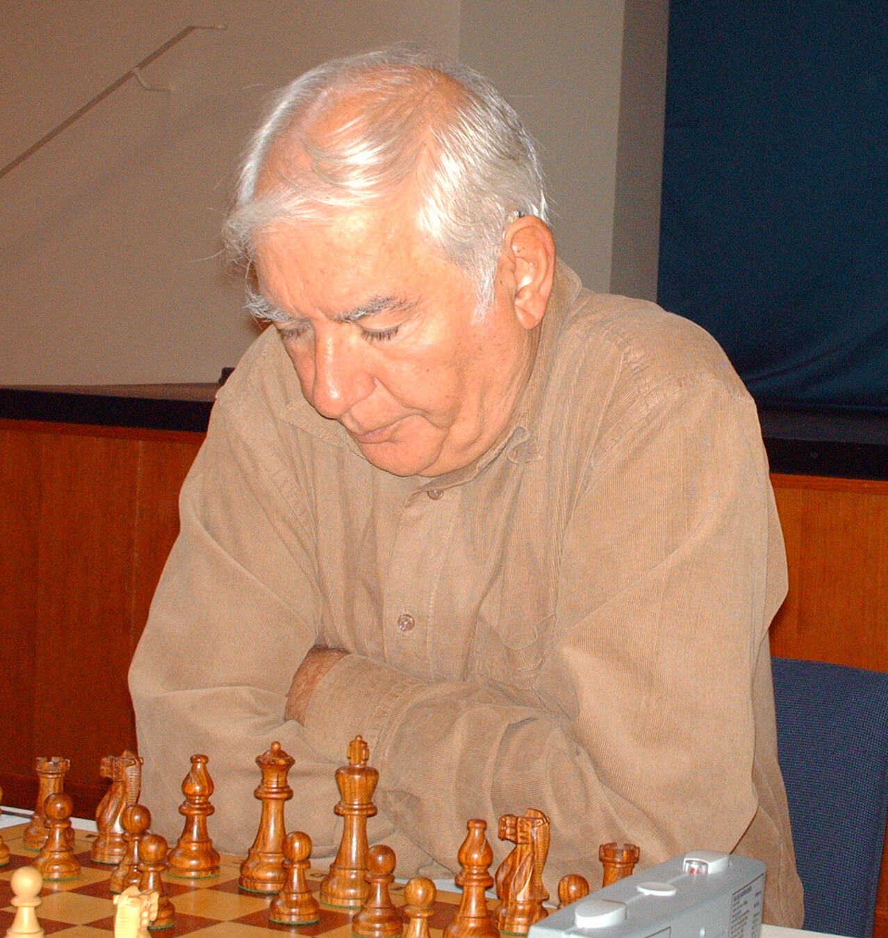 Dieter Mohrlok bei der Deutschen Senioren-Mannschaftsmeisterschaft der Landesverbände in Berlin-Spandau